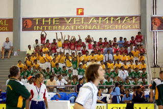 Einzel-WM vor großer Kulisse.